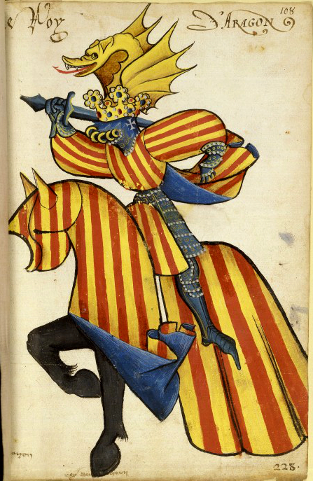 d’Aragon) Alfonso V el Magnánimo con el señal real en sobreveste y gualdrapas del caballo en el Armorial ecuestre del Toison d'Or. Flandre, ca. 1433-1435. Procedente de los Agustinos descalzos de Lyon que perteneció a Jean Lefèvre de Santo-Rémy. Bibliothèque nationale de France. Temple sobre pergamino. París, Bibliothèque de l’Arsénal, ms. 4790, f. 108r, miniatura núm. 228. Cfr. Alberto Montaner, «La problemática del número de elementos en las armerías medievales: diseño frente a representación», Miguel Metelo de Seixas y Maria de Lurdes Rosa (coord.), Estudos de Heráldica Medieval, Lisboa, Instituto de Estudos Medievais; Centro Lusíada de Estudos Genealógicos e Heráldicos, 2012, págs. 125-142; cfr. esp. pág. 130, fig. 2. ISBN 978-989-97066-5-1